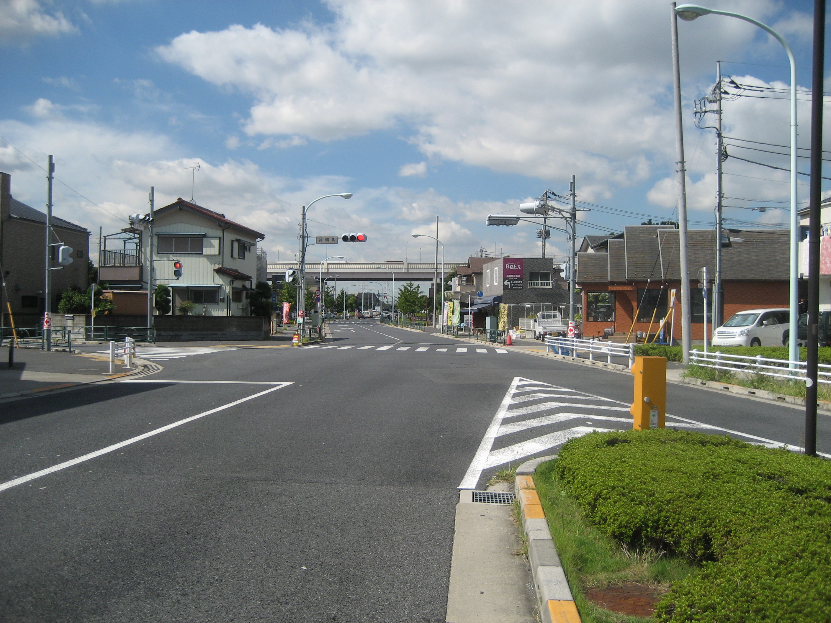 足立区神明町交差点（内匠橋）方向を撮影